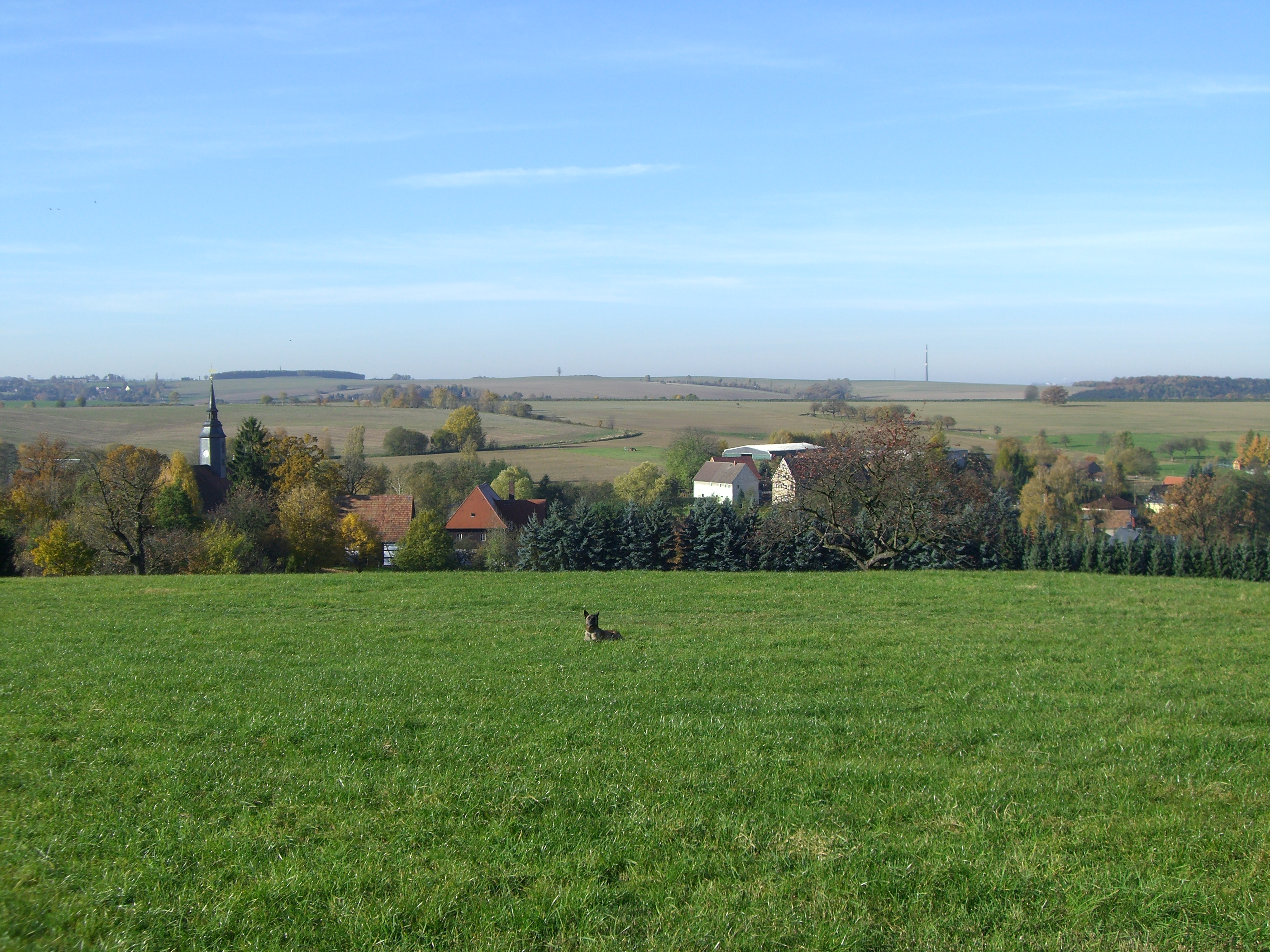 Niederschöna, mit Sicht auf Falkenberg, Kirche Conradsdorf ("Nadelspitze"), und die "Hohe Esse von Halsbrücke"